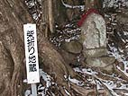 Shibaori-Jizō, Mount Yuzuruha (論鶴羽山 柴折地蔵)